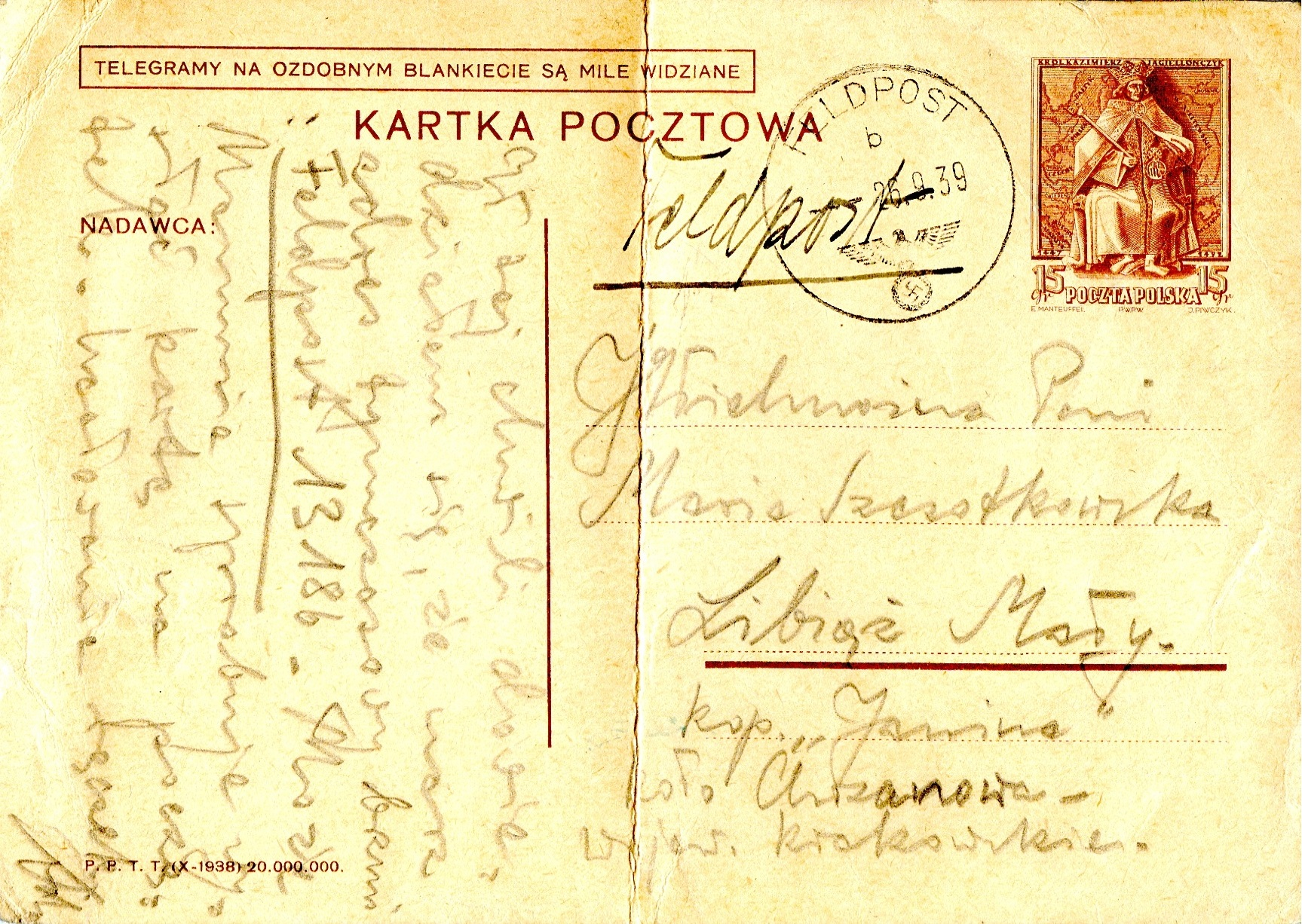 Karta pocztowa wysłana niemiecką pocztą polową 26 września 1939 z z obozu jenieckiego w Krakowie do Libiąża. Przesyłka na blankiecie karty Poczty Polskiej i z nadrukiem polskiego przedwojennego znaczka za 15 groszy, ale już z datownikiem niemieckim i z dopiskiem "Feldpost"